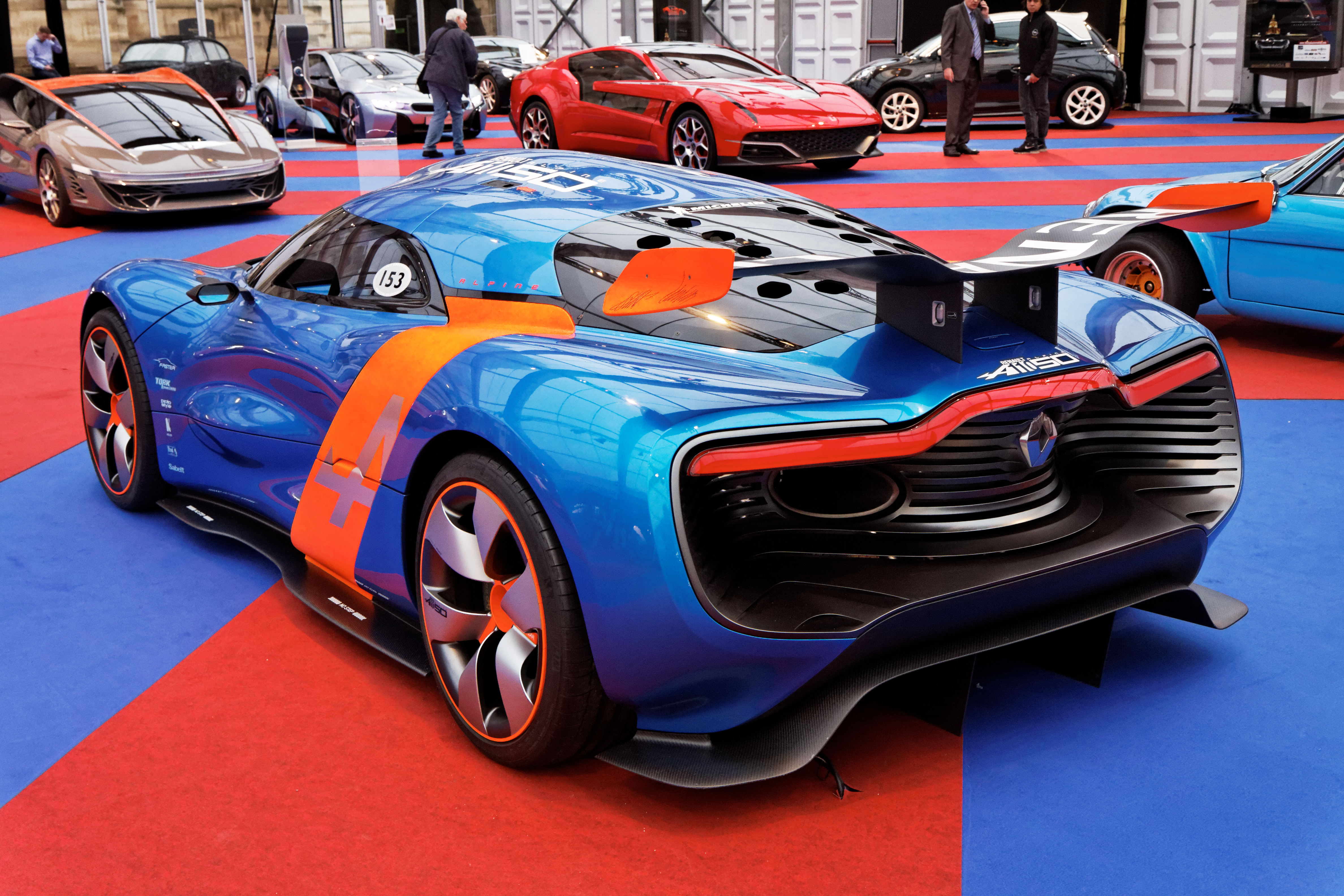 Une Renault Alpine A110 50 Concept exposée lors du festival automobile international 2013.